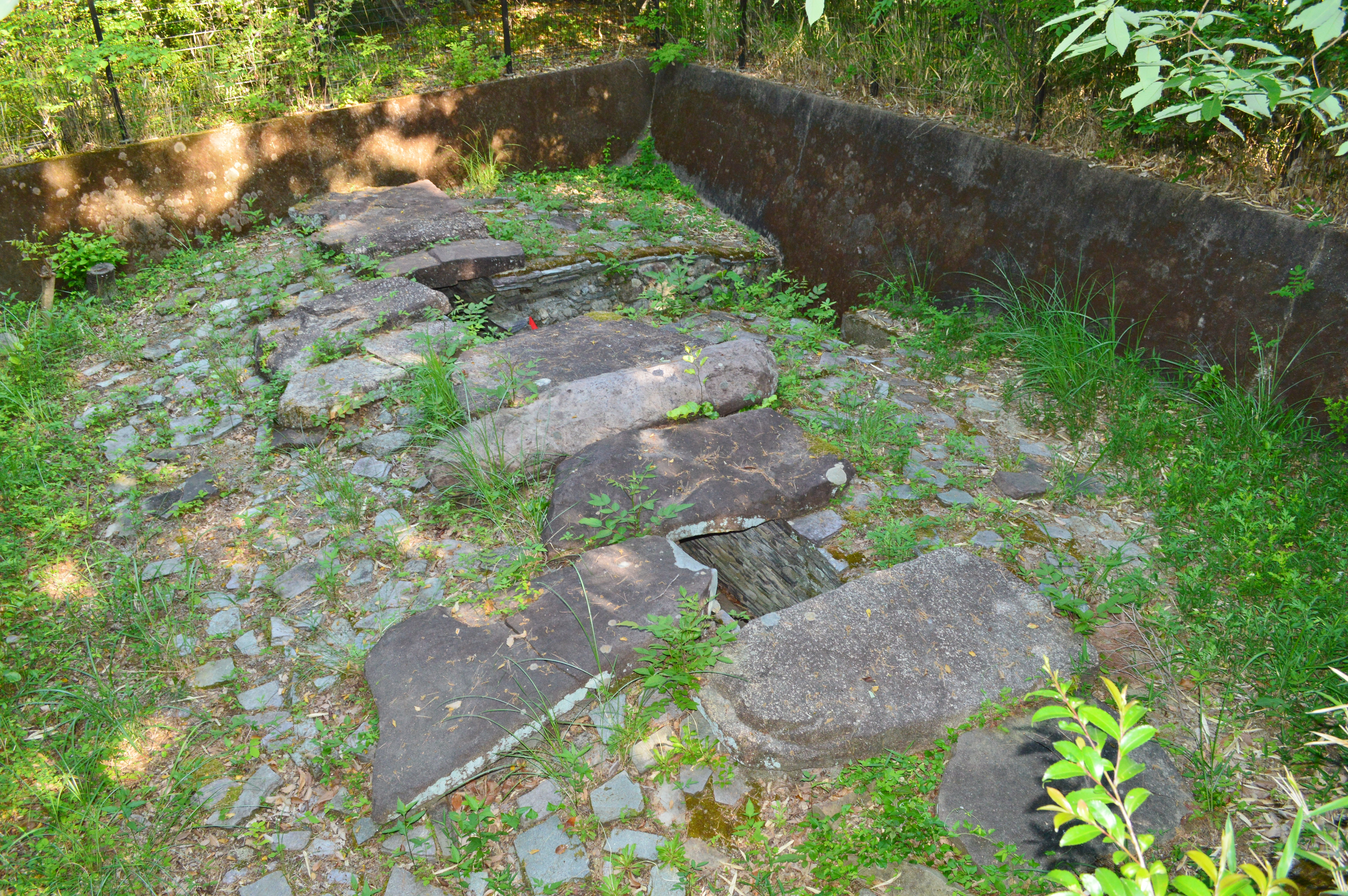 将軍山古墳 (茨木市) 移築竪穴式石室 Nikon D3200